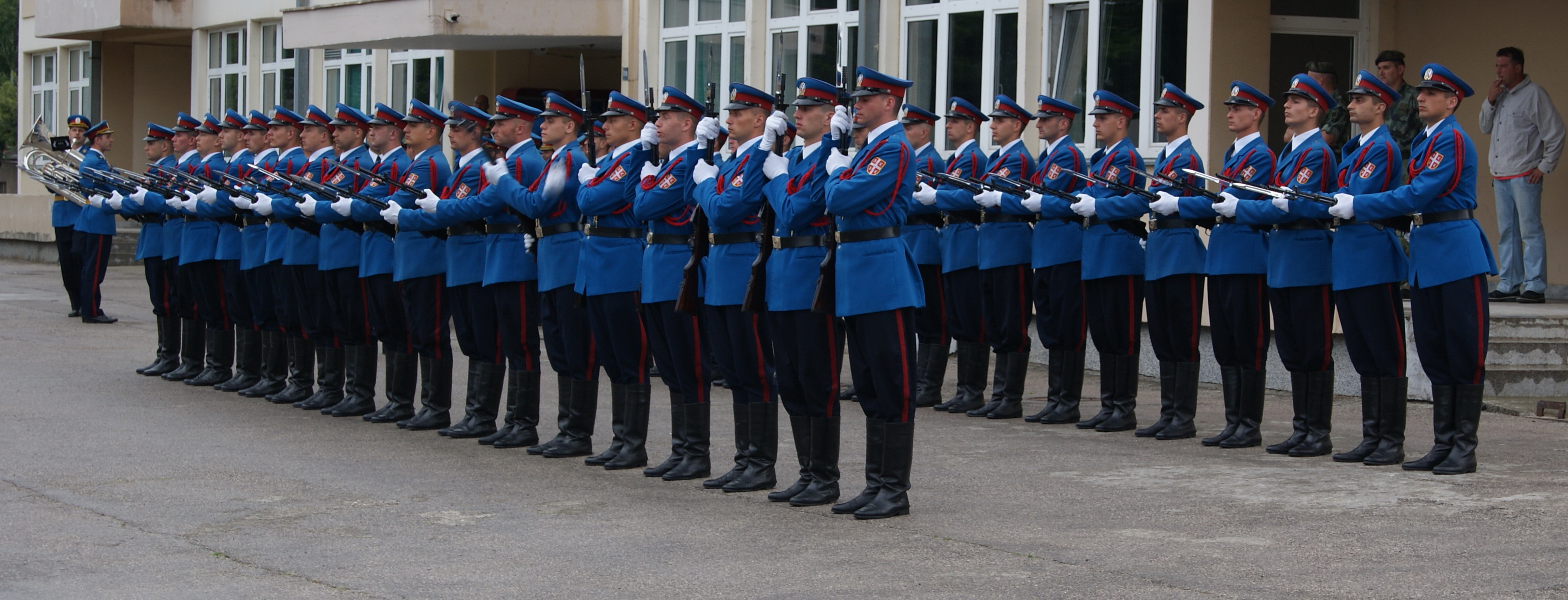 Почасни вод Војске Србије. Војно-полицијска вежба „Заједнички подухват“ 28. јун 2011, Ниш.